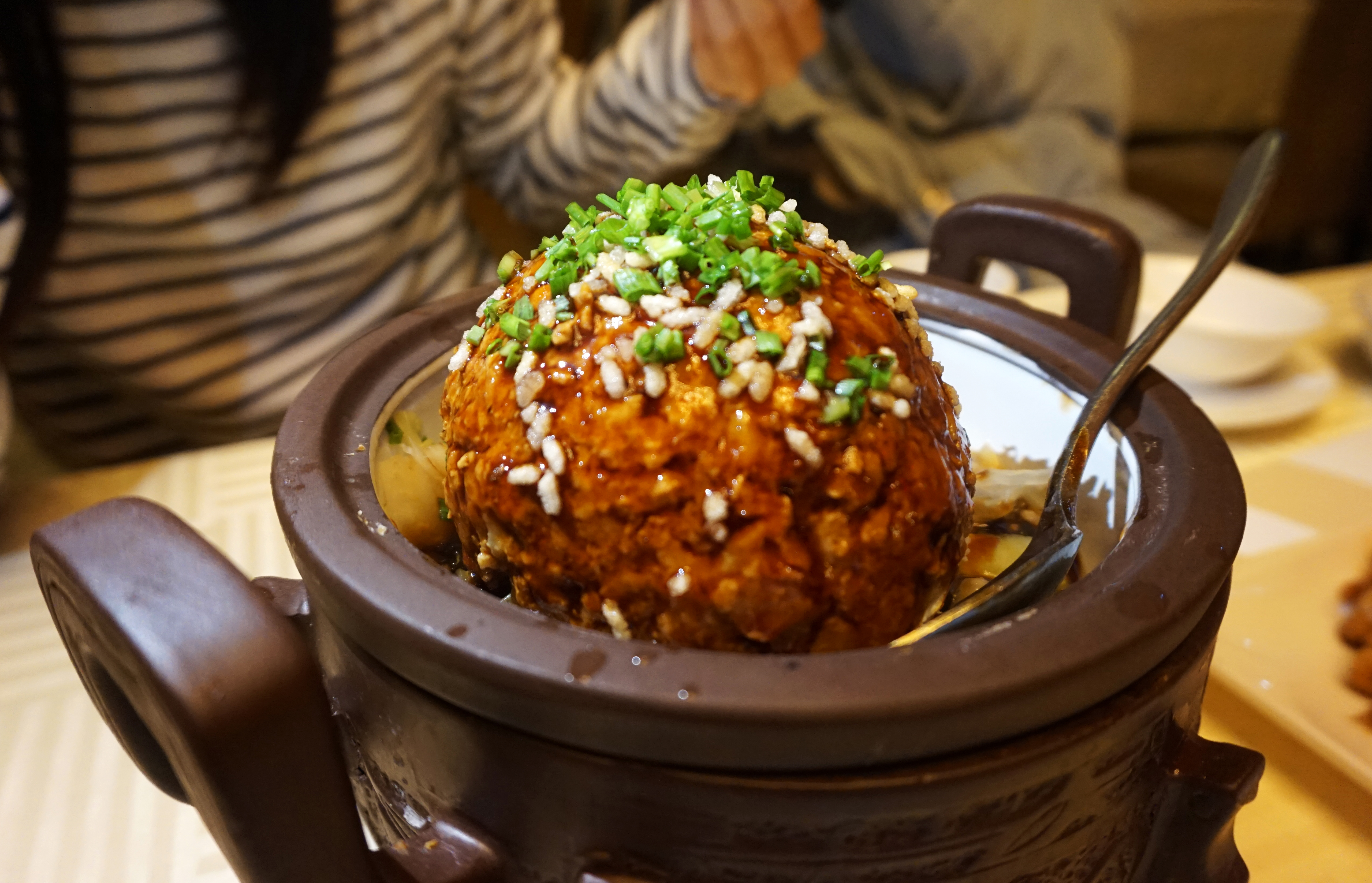 扬州狮子楼的狮子头。